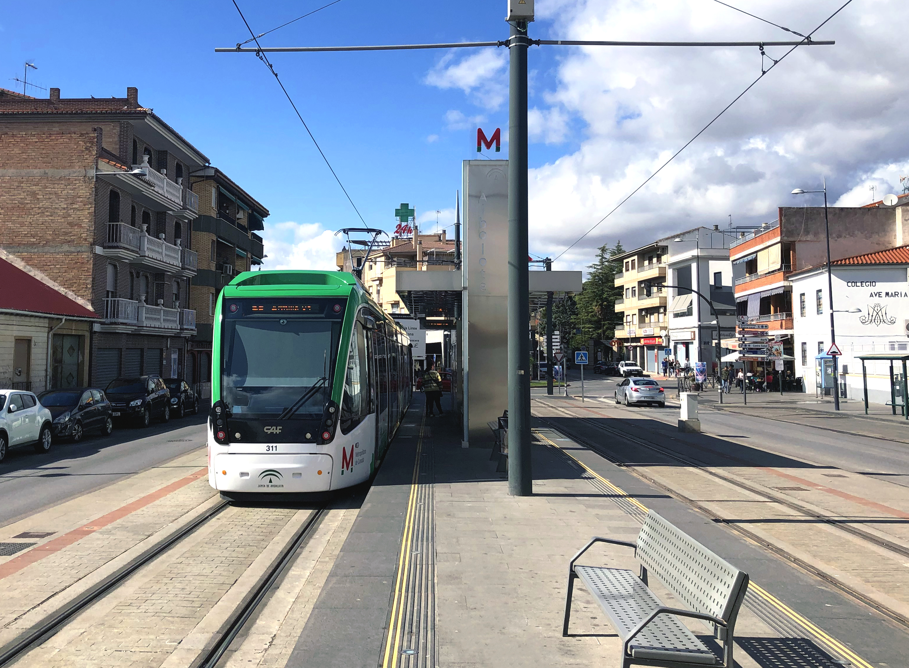 Estación de Albolote del Metro de Granada